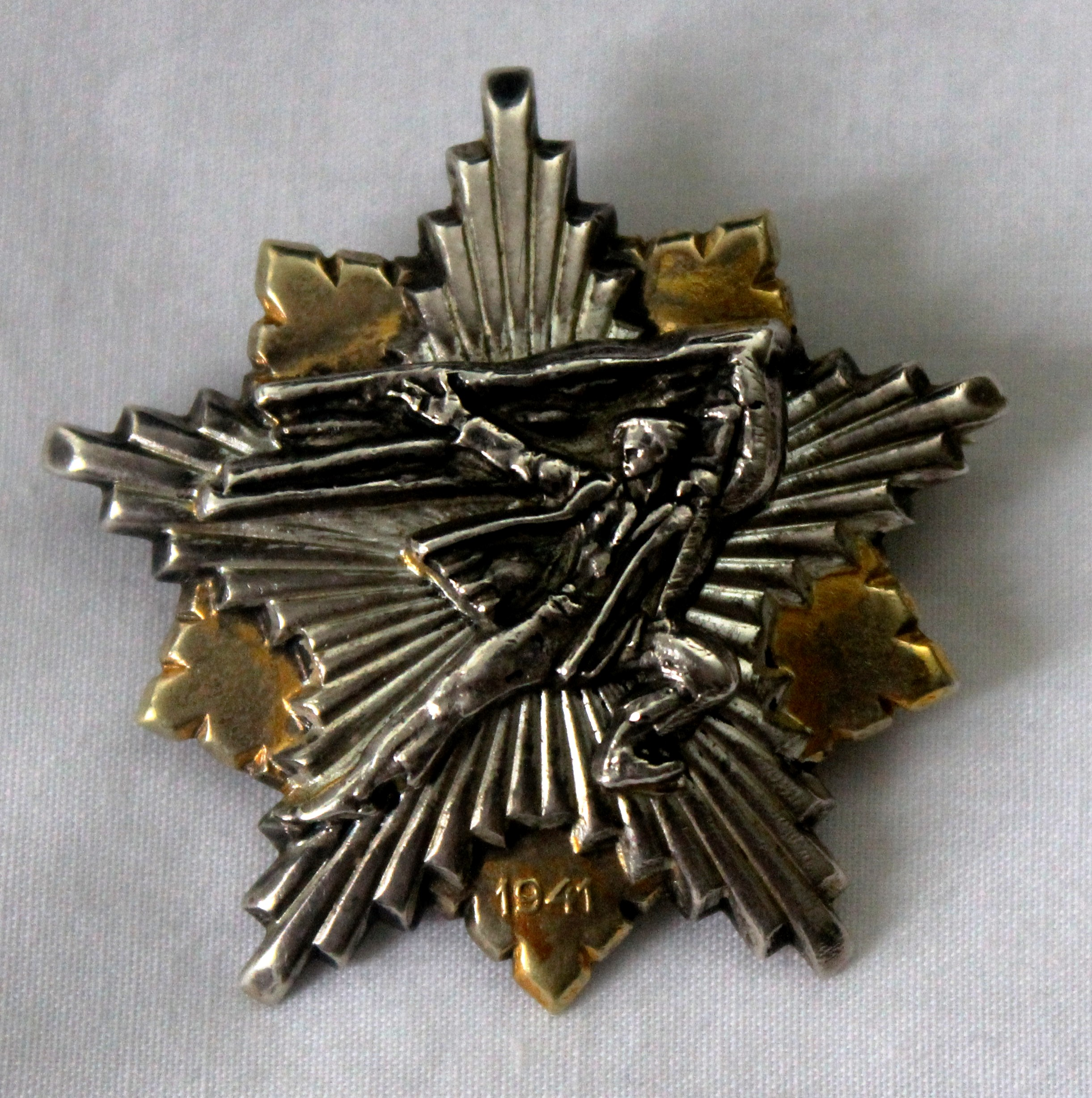 Партизанска споменица 1941.